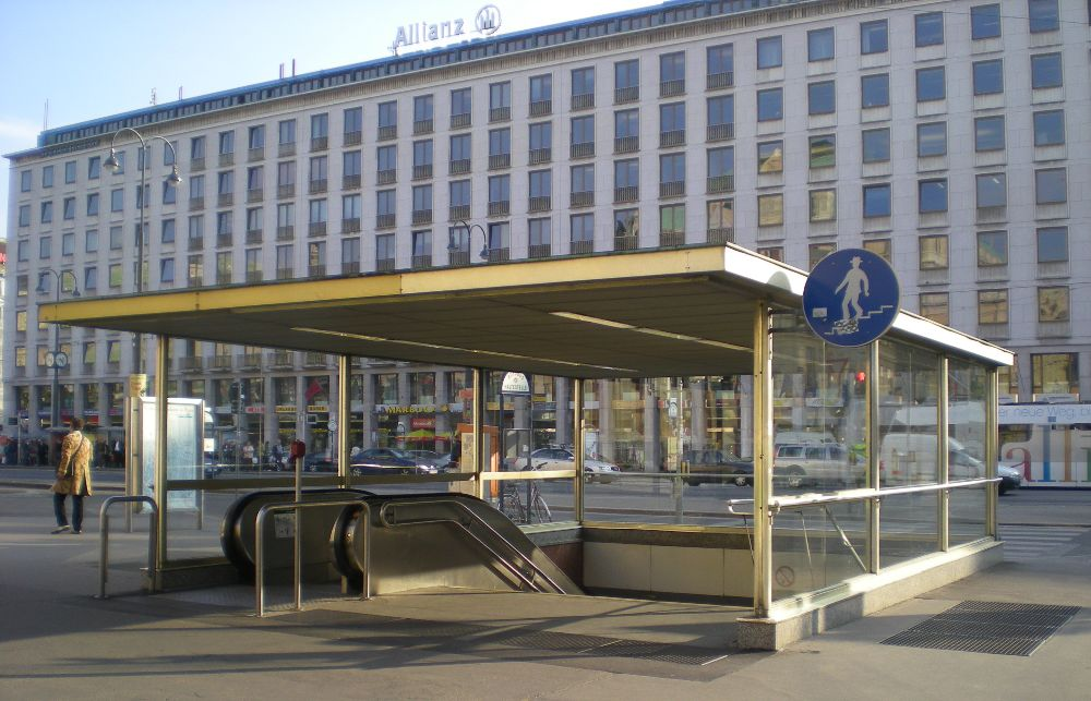 Die Albertinapassage ist eine Fußgängerunterführung unter der Kreuzung Opernring / Operngasse in Wien.